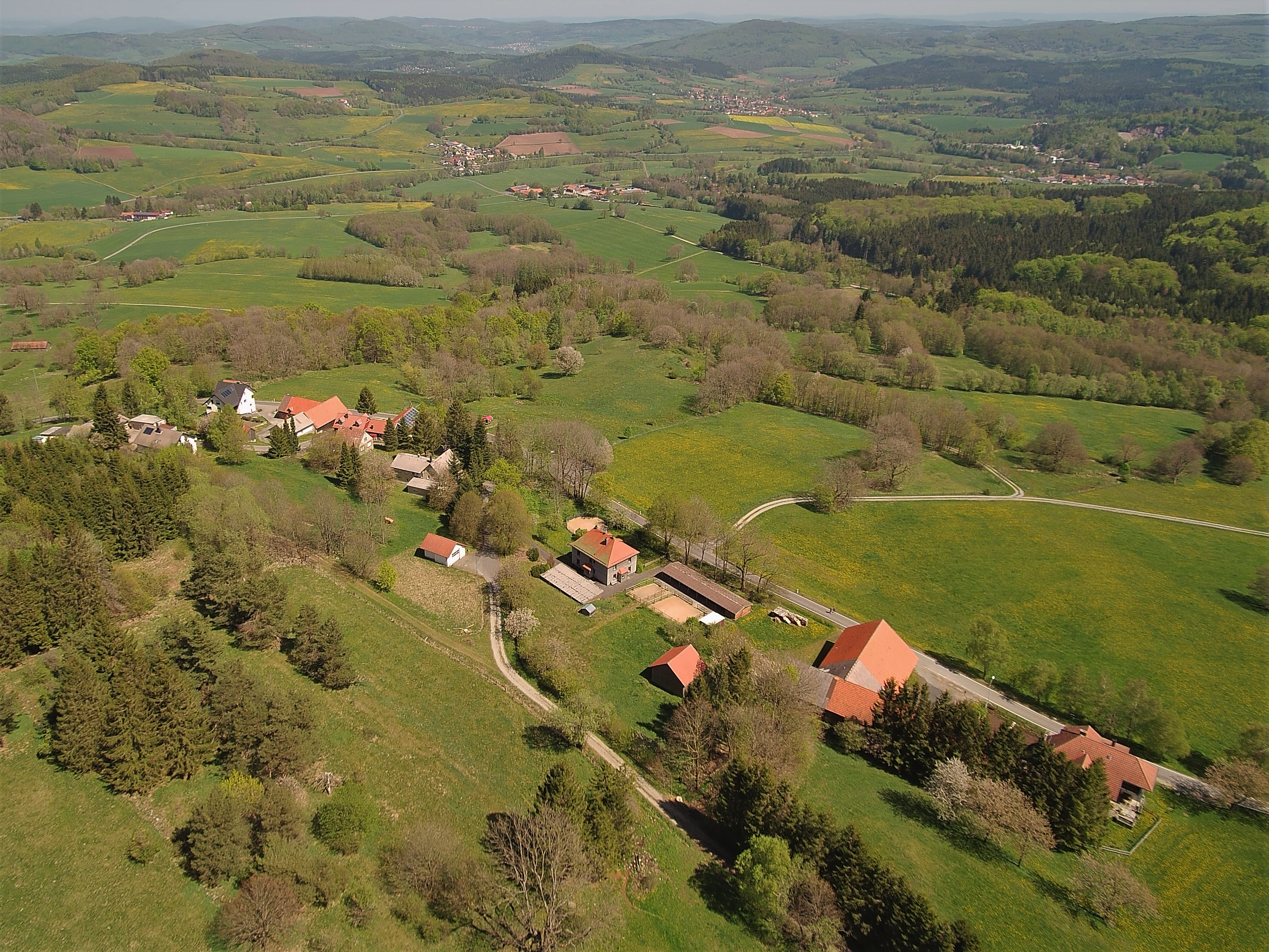 Ortsteil Danzwiesen (Hofbieber), im Hintergrund Ortsteile von Hilders